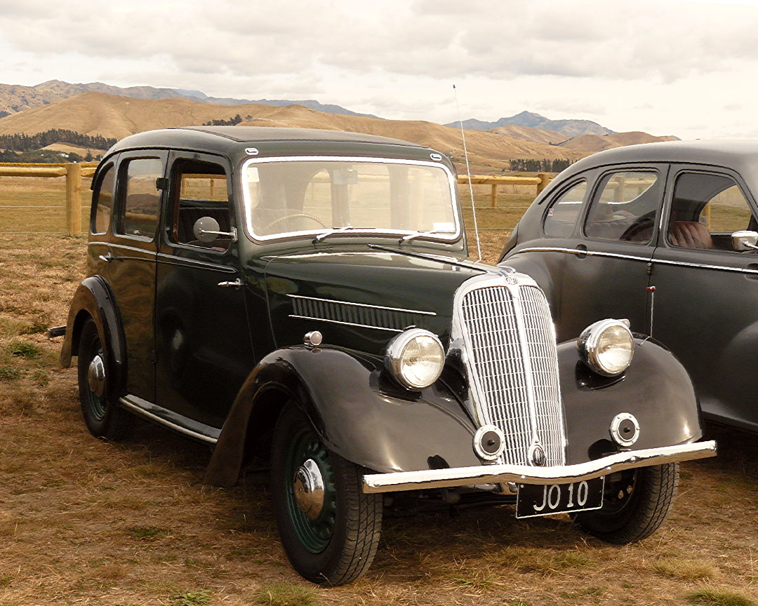 1937 Jowett 10